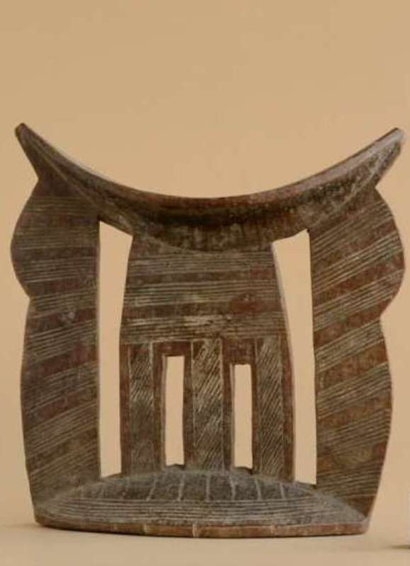 APPOGGIATESTA - Sul basamento incisioni a linee parallele. Si levano tre supporti (due laterali e uno centrale bipartito) che sostengono la base curvilinea incisa ai lati, su cui poggia la testa di chi dorme. Questi appoggiatesta sono usati dagli uomini, sono strettamente associati alla persona dei proprietari e sono spesso sepolti con loro. Gli appoggiatesta in Africa sono utilizzati per preservare l'acconciatura durante il sonno, per avere una maggiore aerazione della testa e per favorire sogni propizi. Il sogno è una delle vie attraverso cui le divinità e gli antenati si manifestano agli esseri umani.